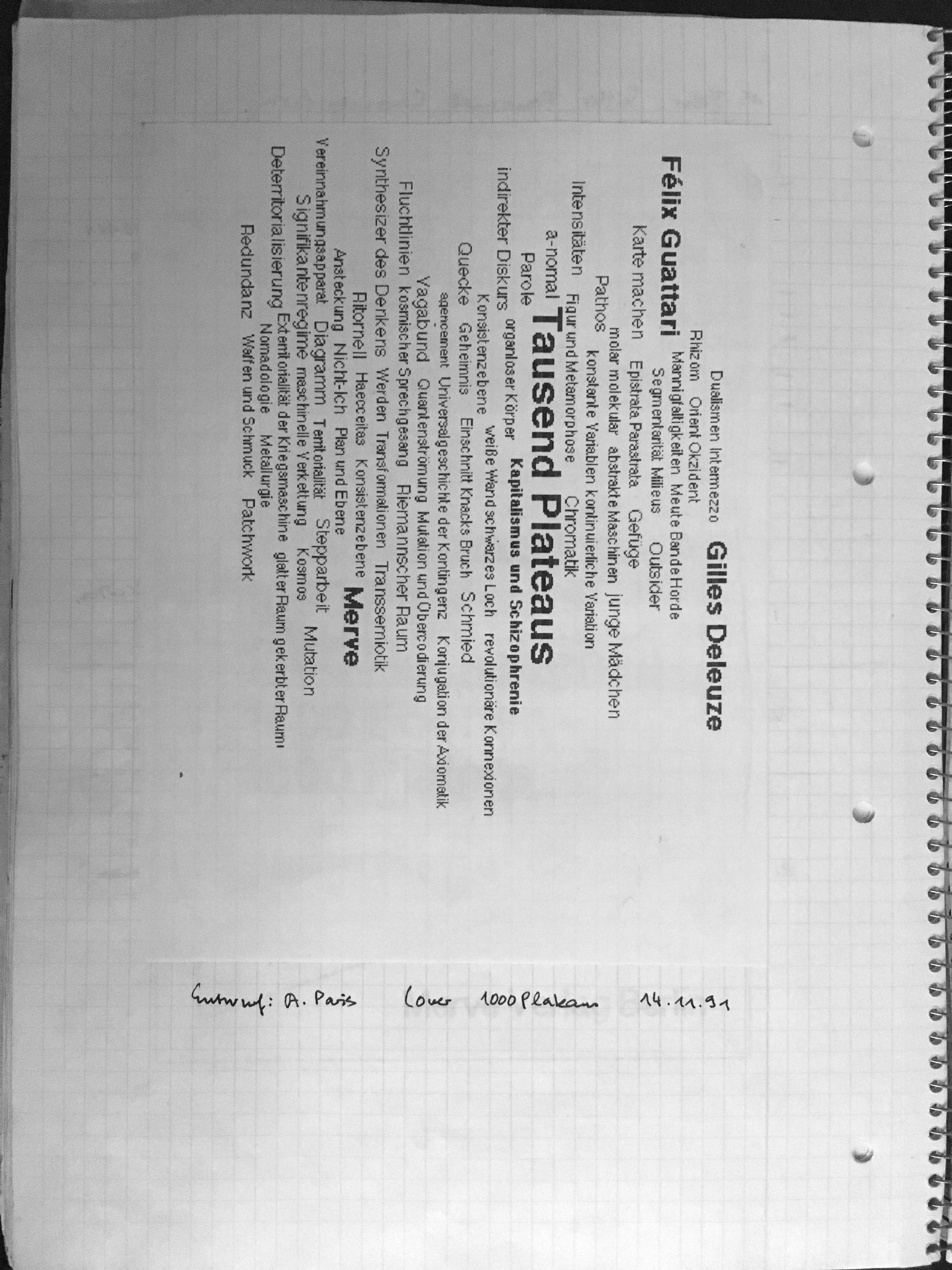 Entwurfsskizze von Heidi (Adelheid) Paris für das Cover des Buches "Tausend Plateaus" von Gilles Deleuze und Fèlix Guattari (Berlin 1992)